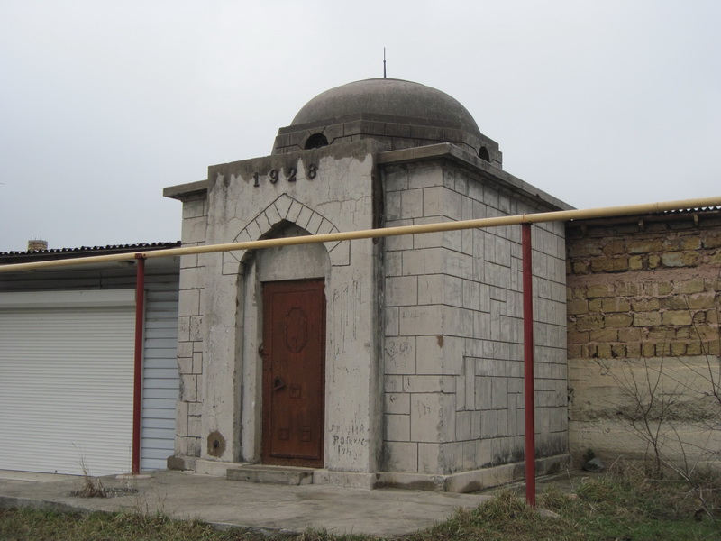 Каптажная будка Аянского водохранилища , Крым